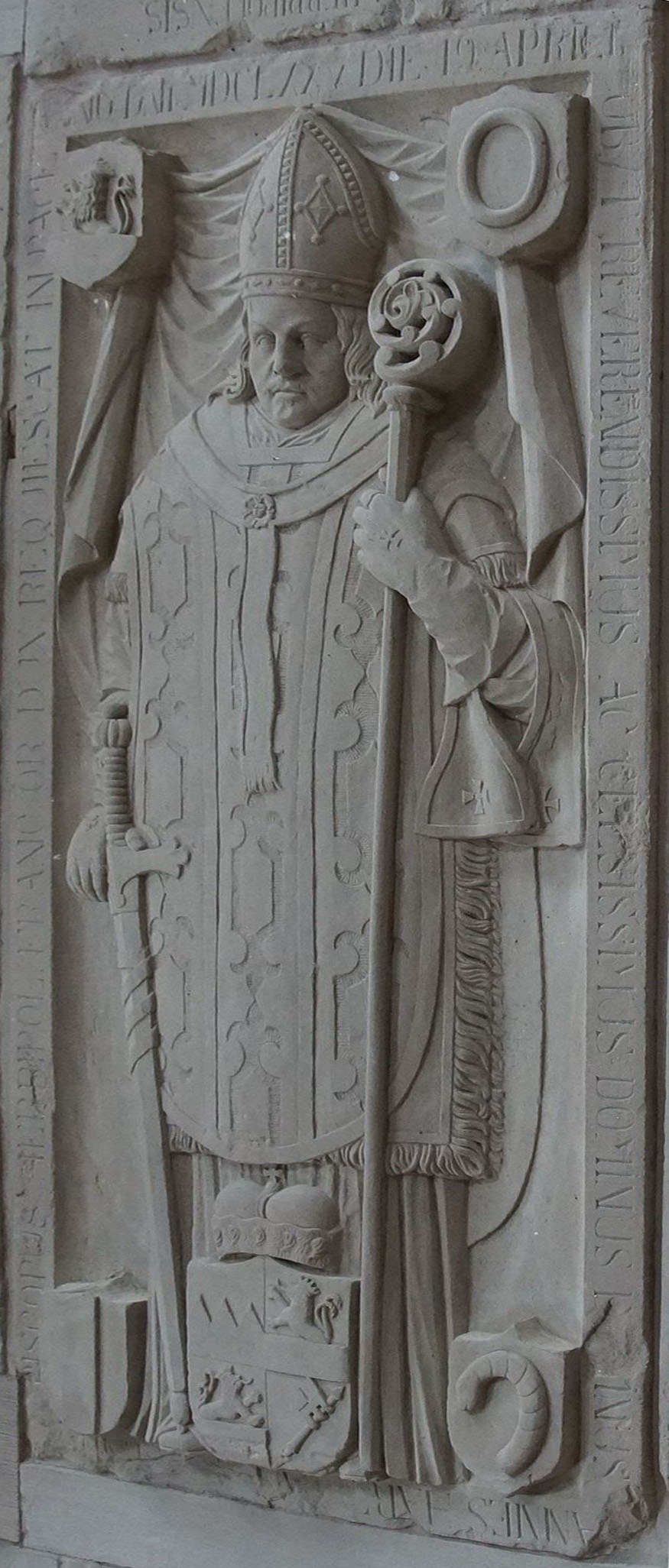 Grablege in der Marienkirche in der Festung Marienburg in Würzburg, Johann Hartmann von Rosenbach 15. Dezember 1609; † 19. April 1675